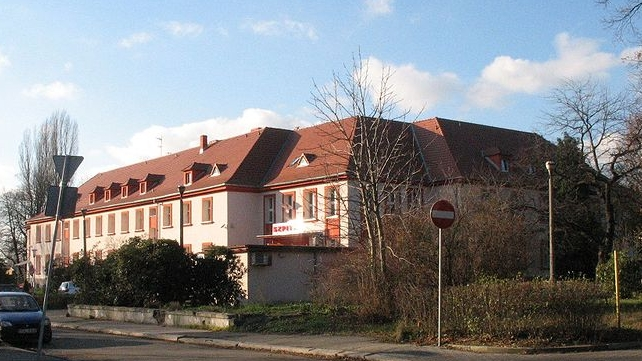 Szpital nr 3 w Gliwicach, w latach 50. XX w siedziba dowództwa 11 Korpusu Armijnego.